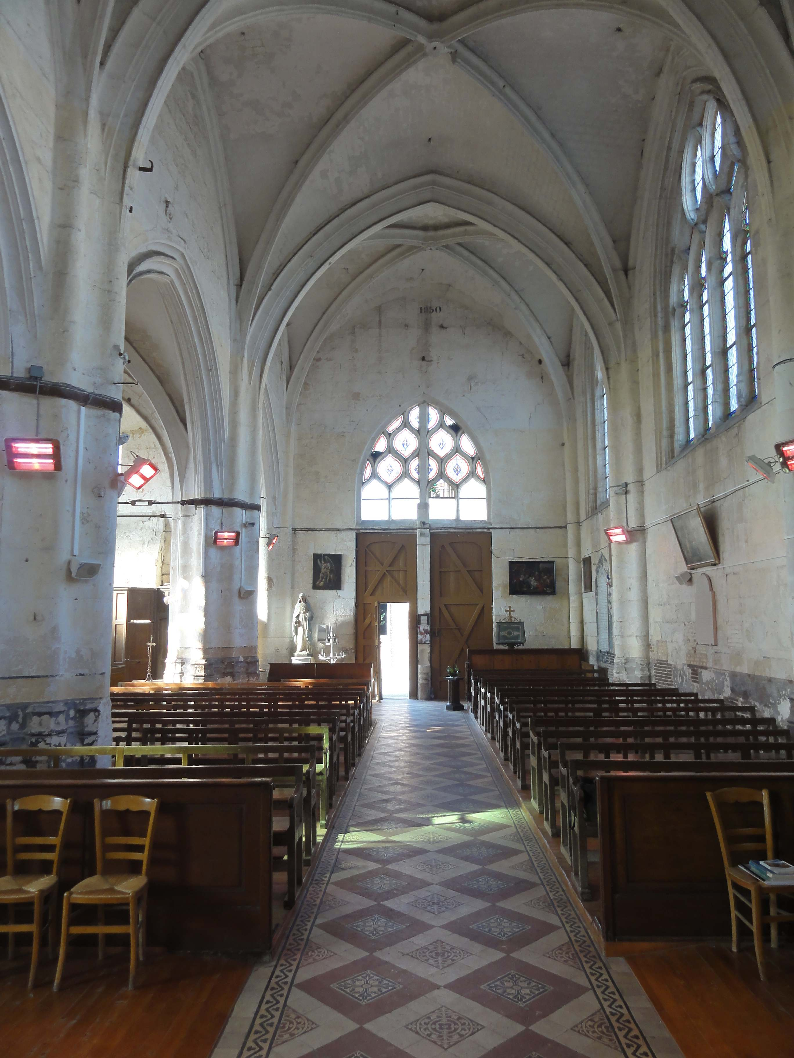 Intérieur de l'église - voir titre.